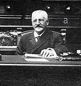 Justizminister Heinrich von Thelemann (1851-1923) im bay. Parlament